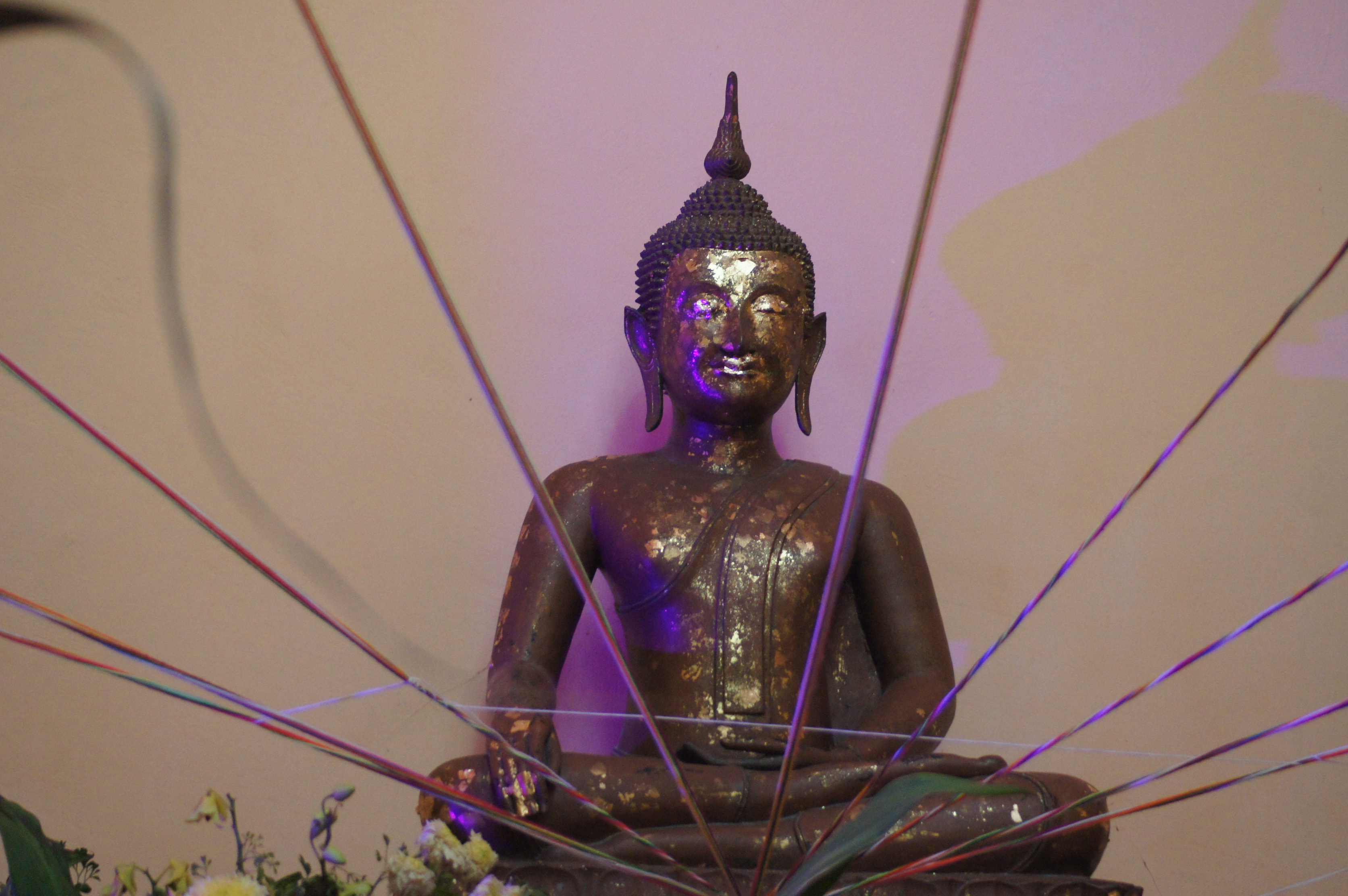 หลวงพ่อพระพุทธวารีรักษ์ พระศักดิ์สิทธิ์คู่บ้านคู่เมืองโพนทราย